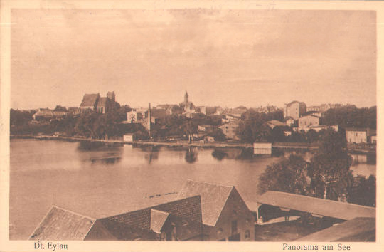 Widok na jezioro Mały Jeziorak. Na pierwszym planie Stajnia-Wozownia (obecna Tawerna kaper).